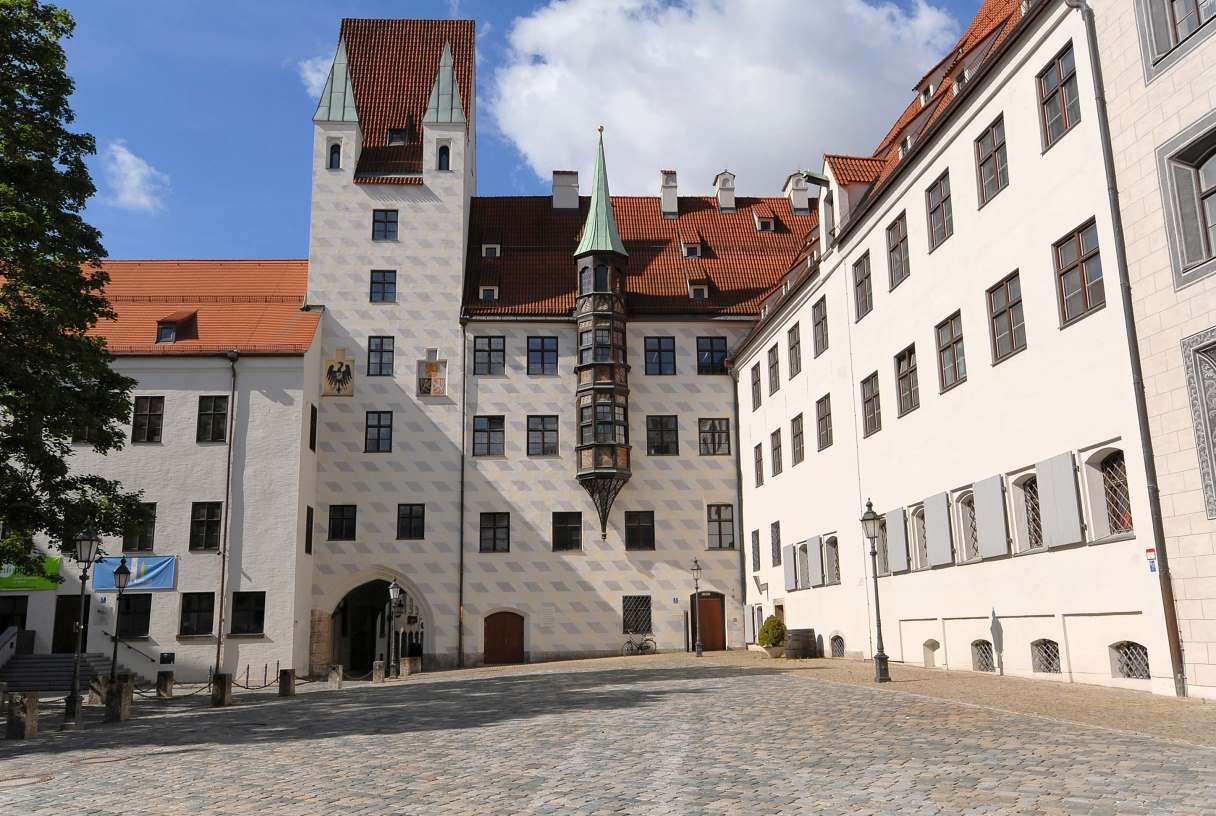 AlterHof, Burgstock